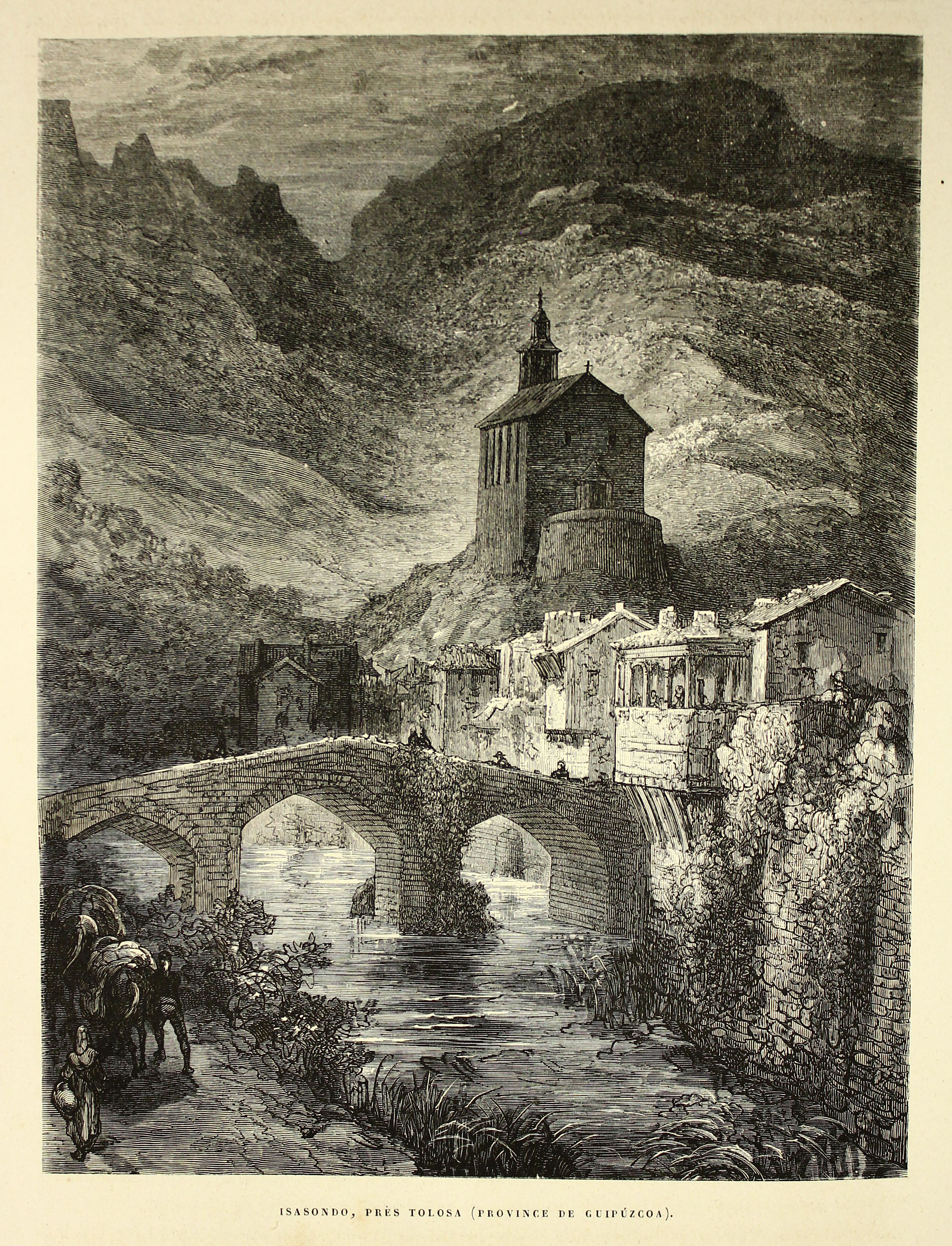 Autor: Davillier, Jean Charles, barón, 1823-1883 Descripción bibliográfica: L'Espagne / par Le Baron CH. Davillier ; ilustrée de 309 gravures dessinées su bois par Gustave Doré. - Paris : Librairie Hachette, 1874. - 799 p. : il. Materia: España- Geografía Materia: España- Usos y costumbres Ilustrador: Doré, Gustave, 1832-1883 Editor: Libreria Hachette Lugar de impresión: Francia, París Localización: Libro completo